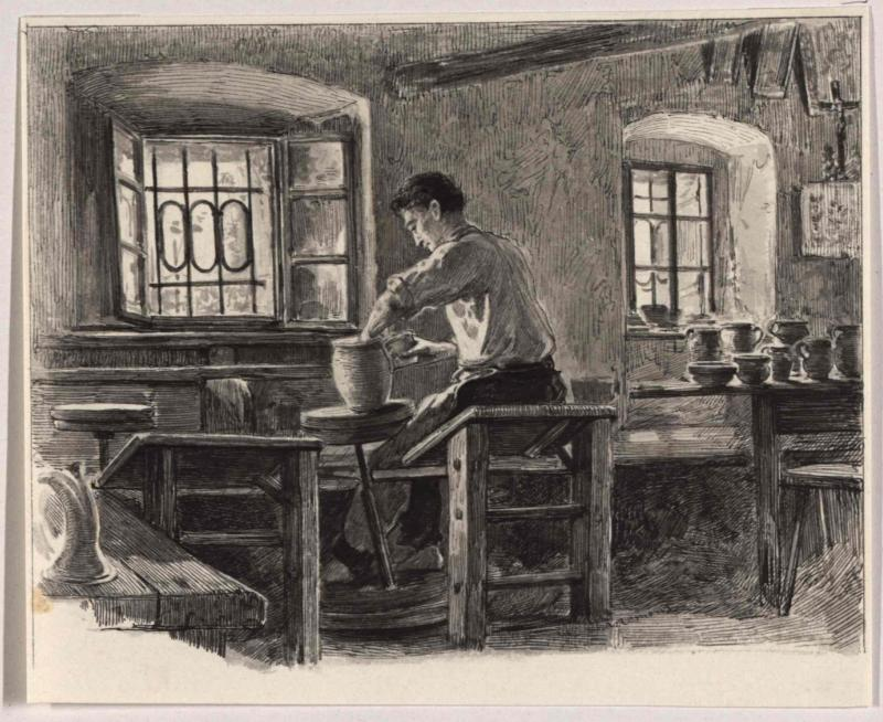 Landtöpferei im Krain